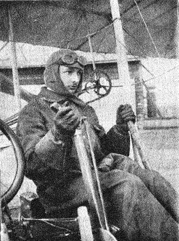 Gerhard Sedlmayr, deutscher Flugpionier